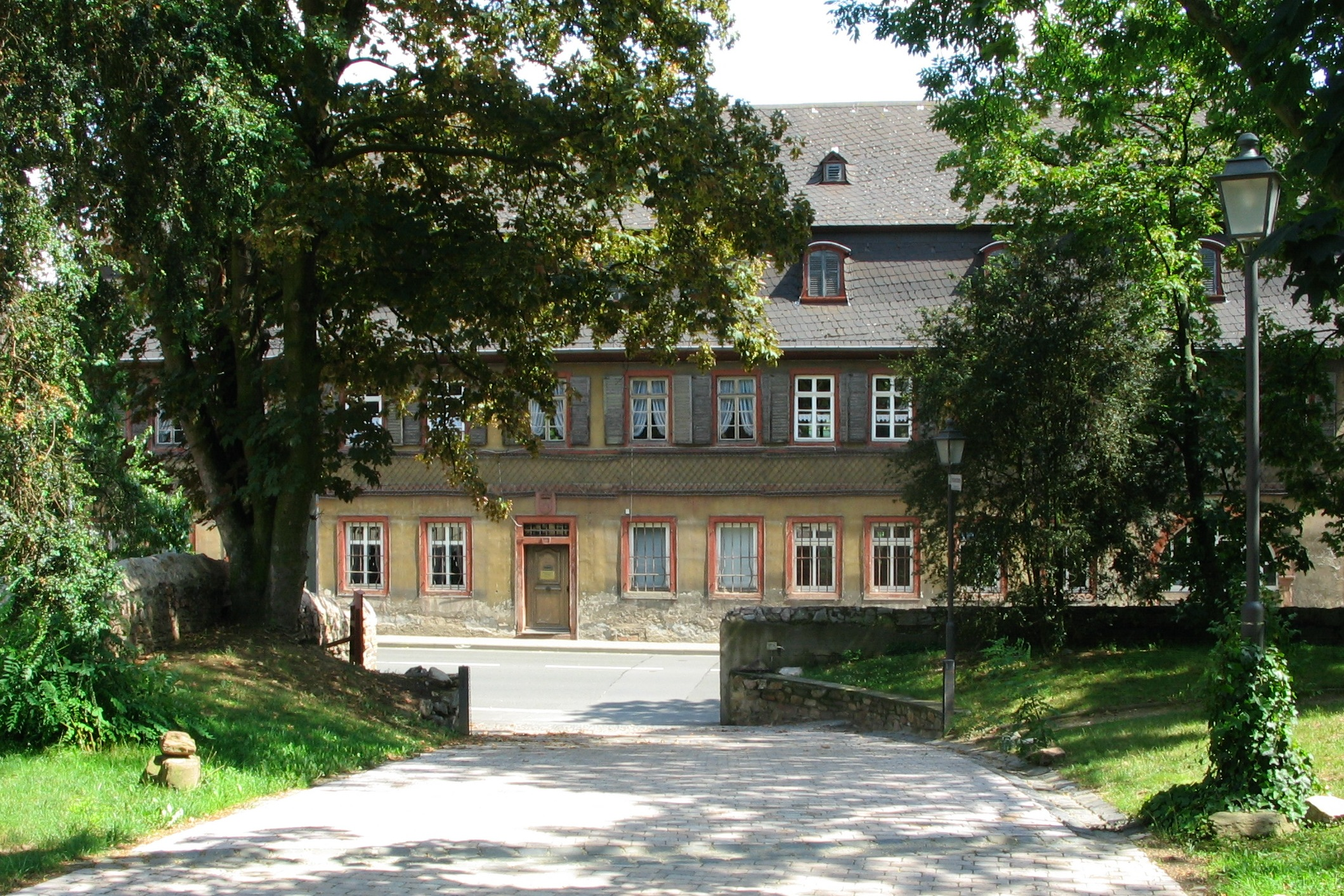 Brentanohaus an der Hauptstraße von Winkel im Rheingau, Blick von der gegenüber liegenden Brentanoscheune aus.